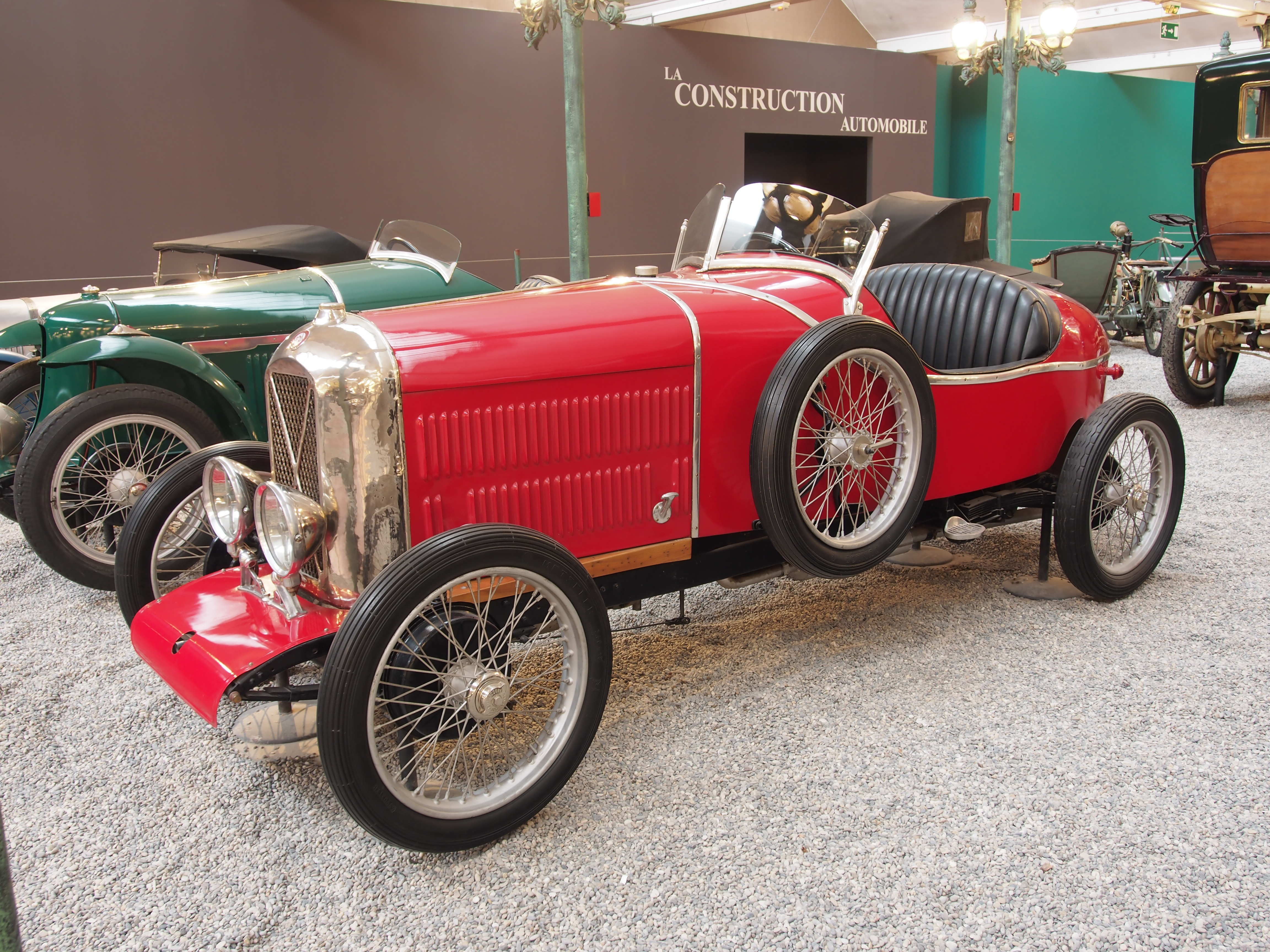 Photographed at the Cité de l’Automobile, Musée national de l’automobile, Collection Schlumpf, Mulhouse, France.